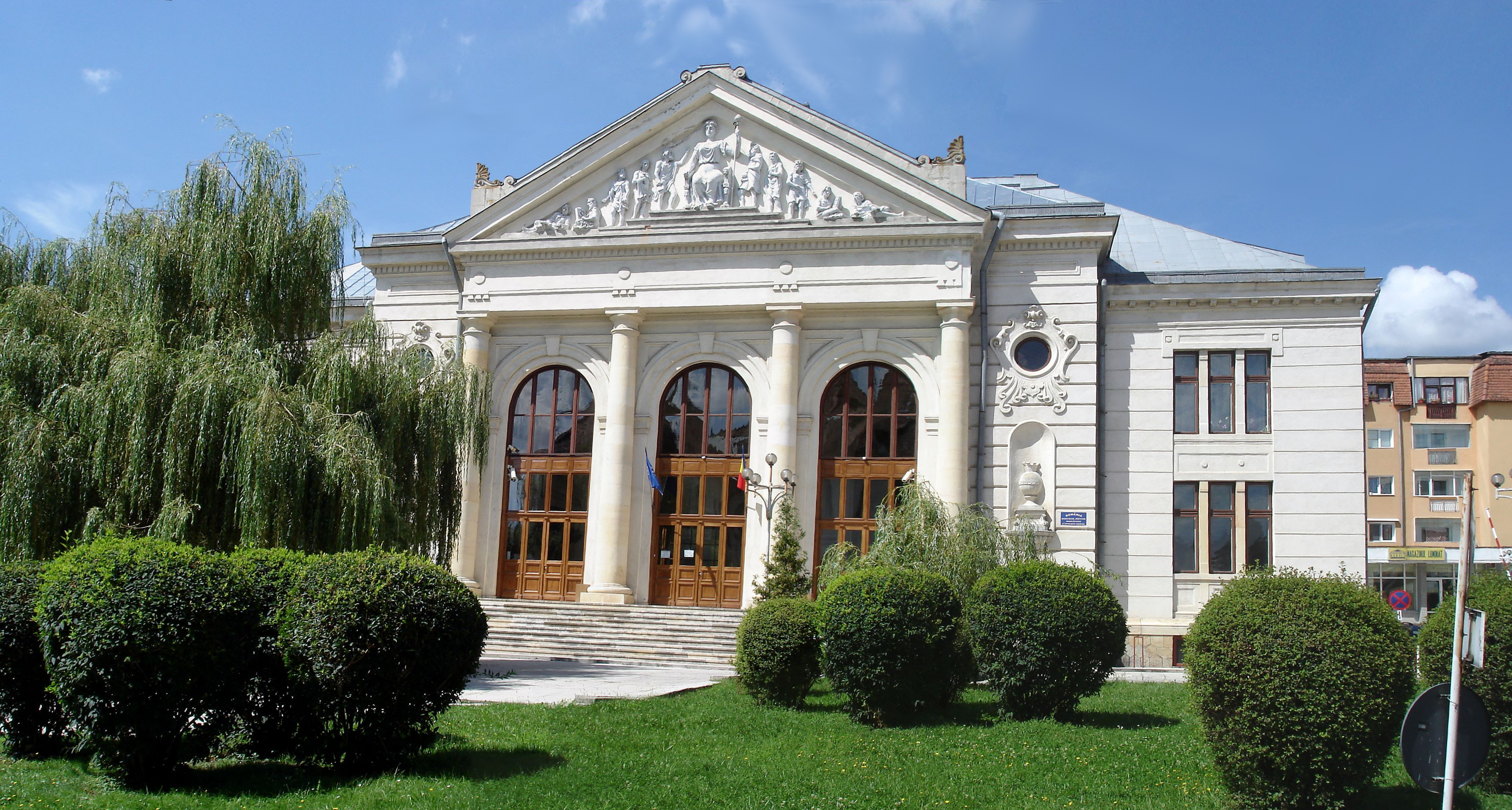 Tribunalul orășenesc (1900), municipiul Câmpulung, Str. Paveliu Emilian 2, LMI AG-II-m-B-13574